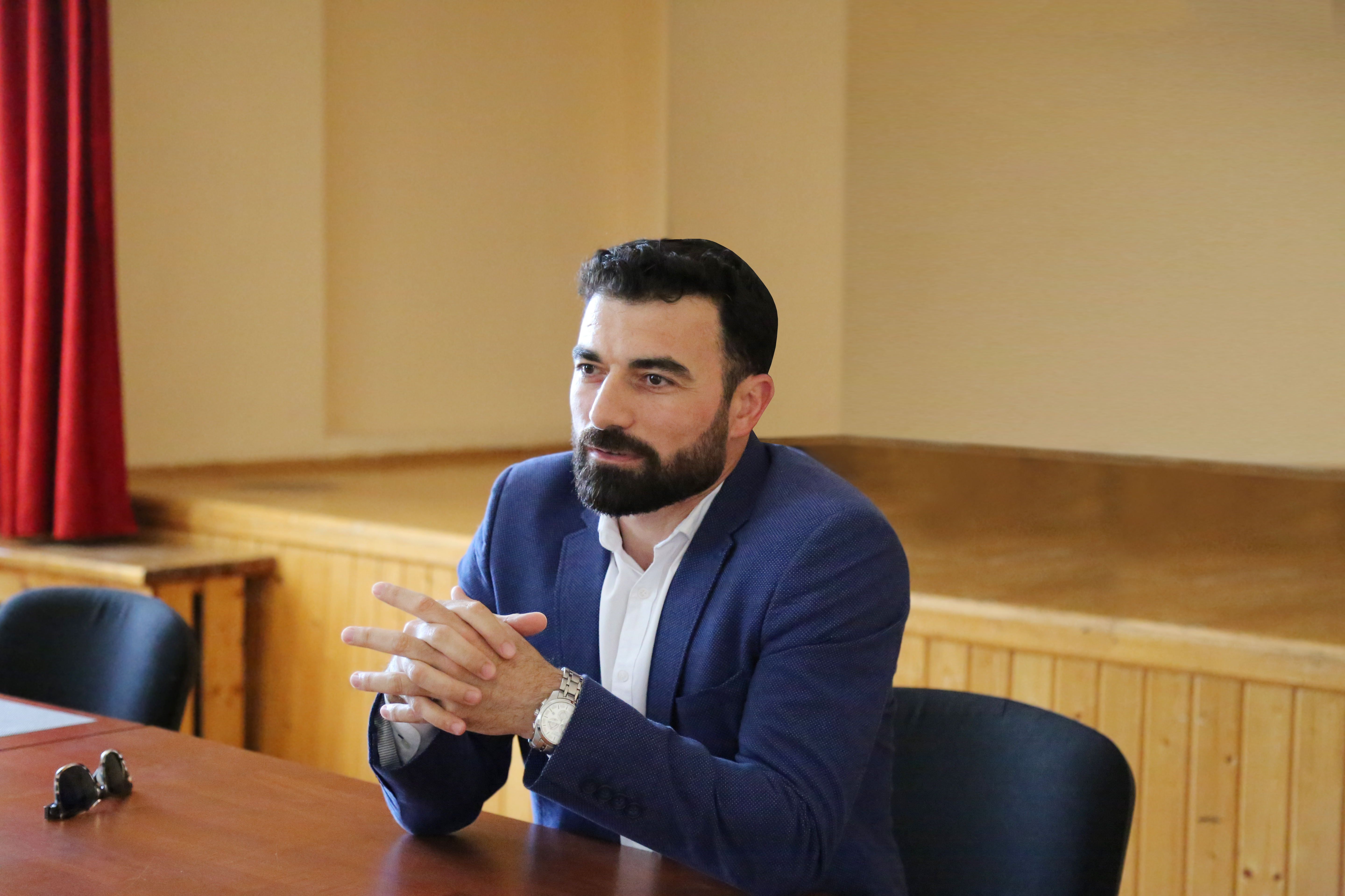 Rövşən Abdullaoğlu